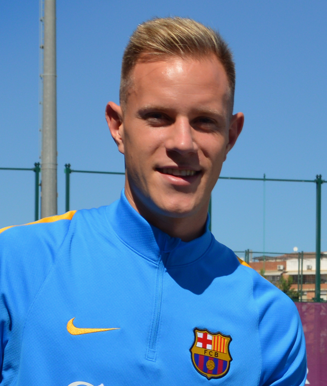 Marc-André ter Stegen (FC Barcelona), Mattias Ekström (EKS)